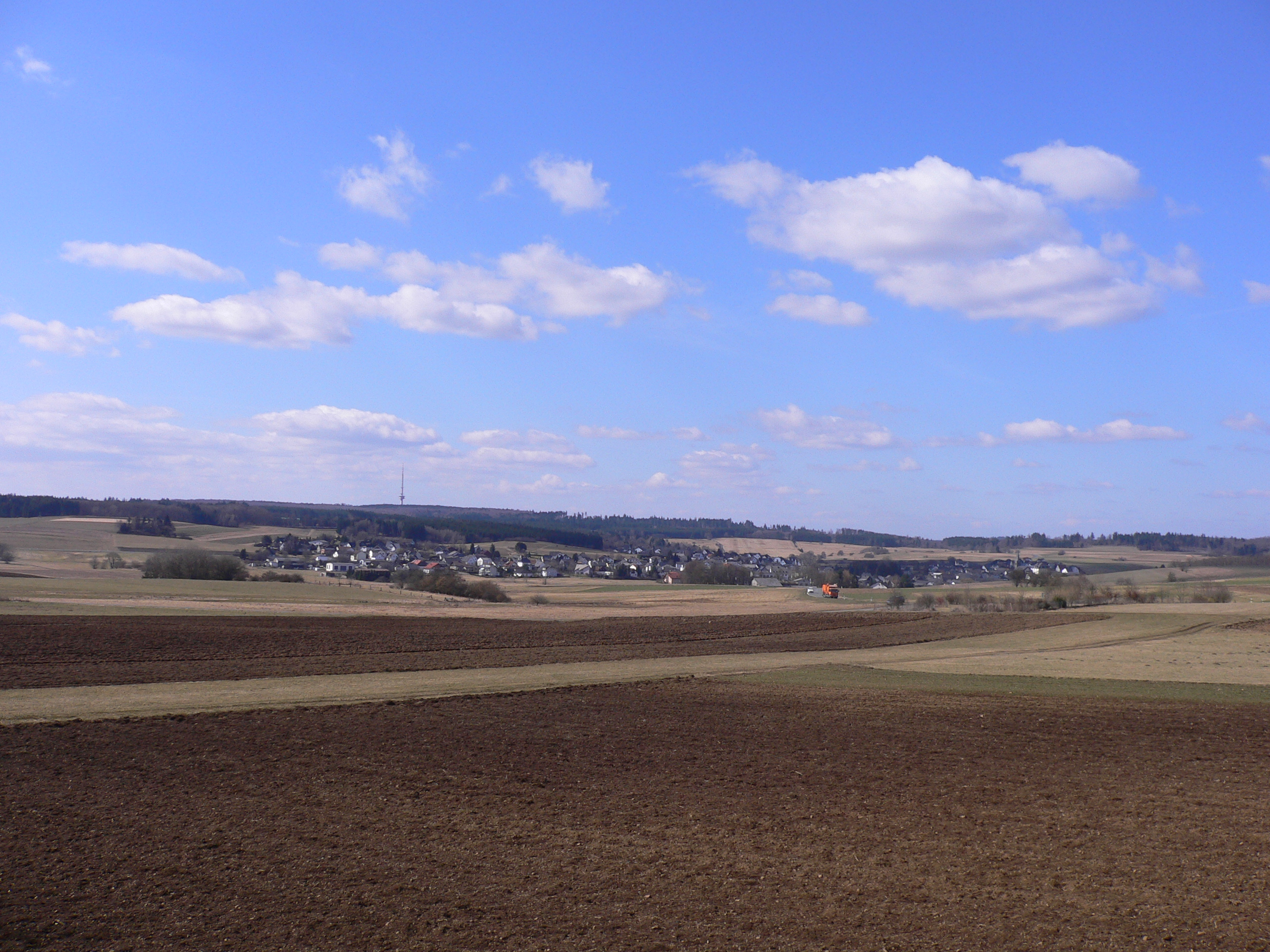 Bottenhorner Hochfläche